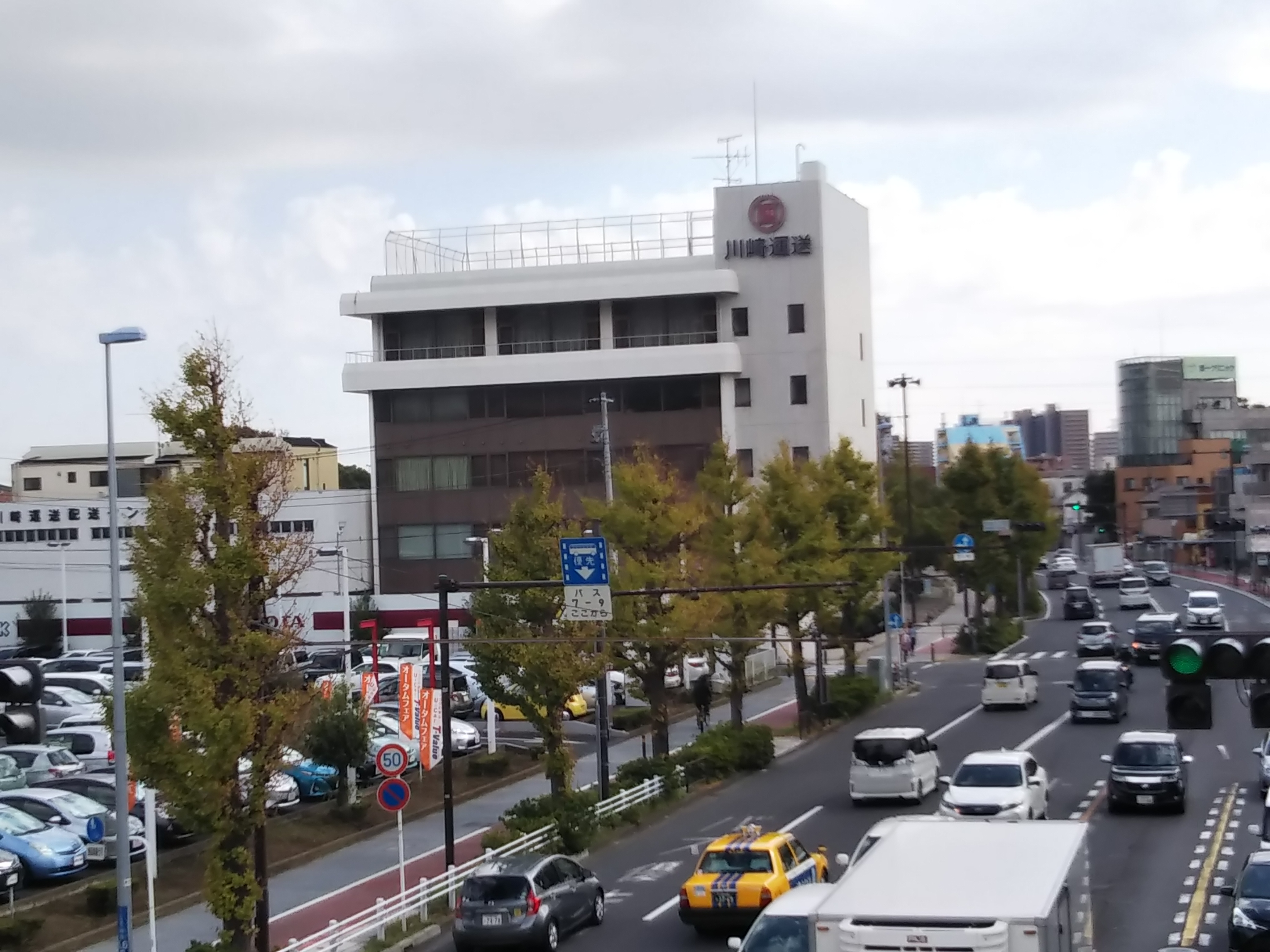 川崎市川崎区、川崎運送本社